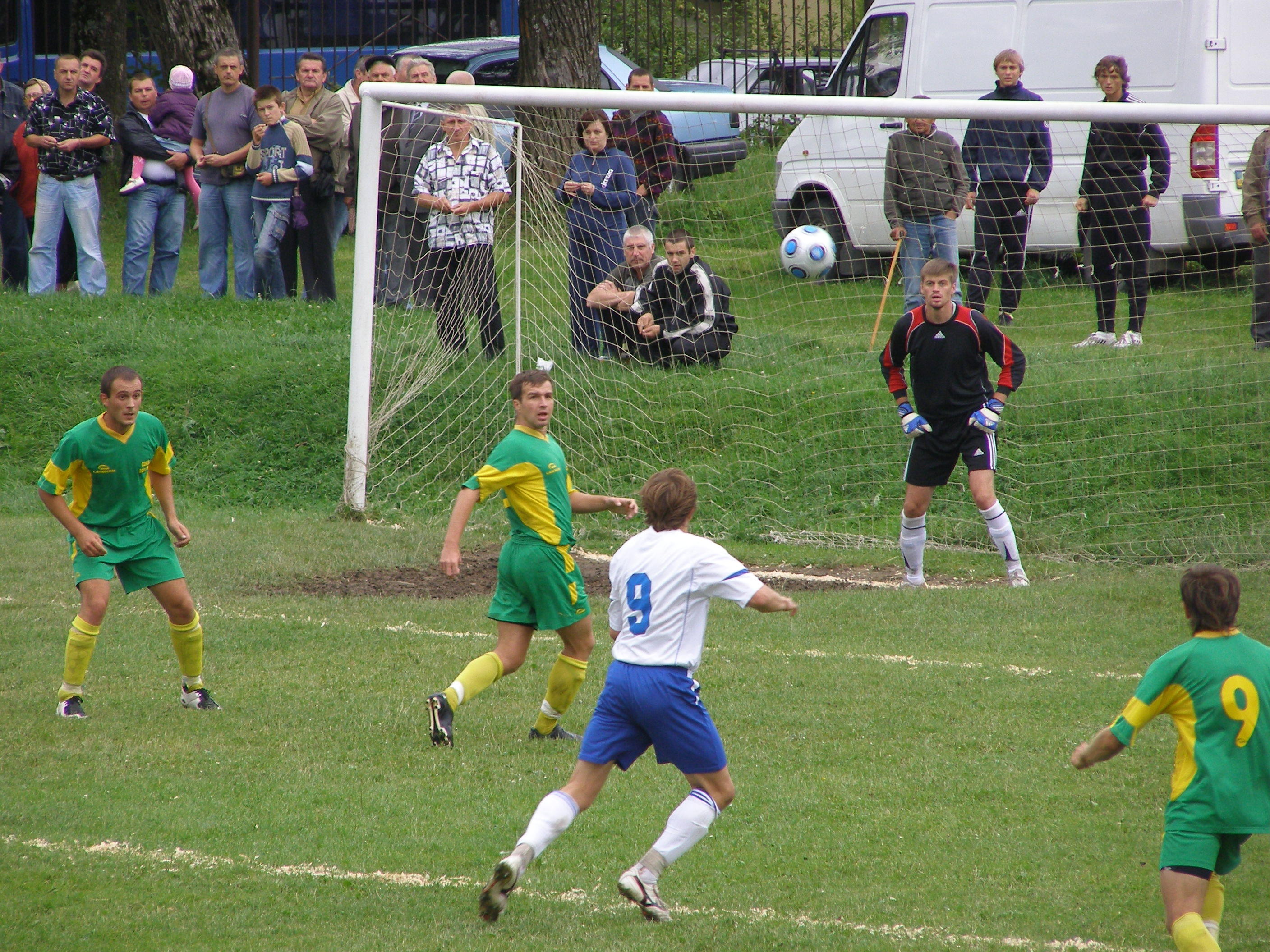 Naftusia (weißes T-Shirt) vs Sokil (grüne T-Shirts)